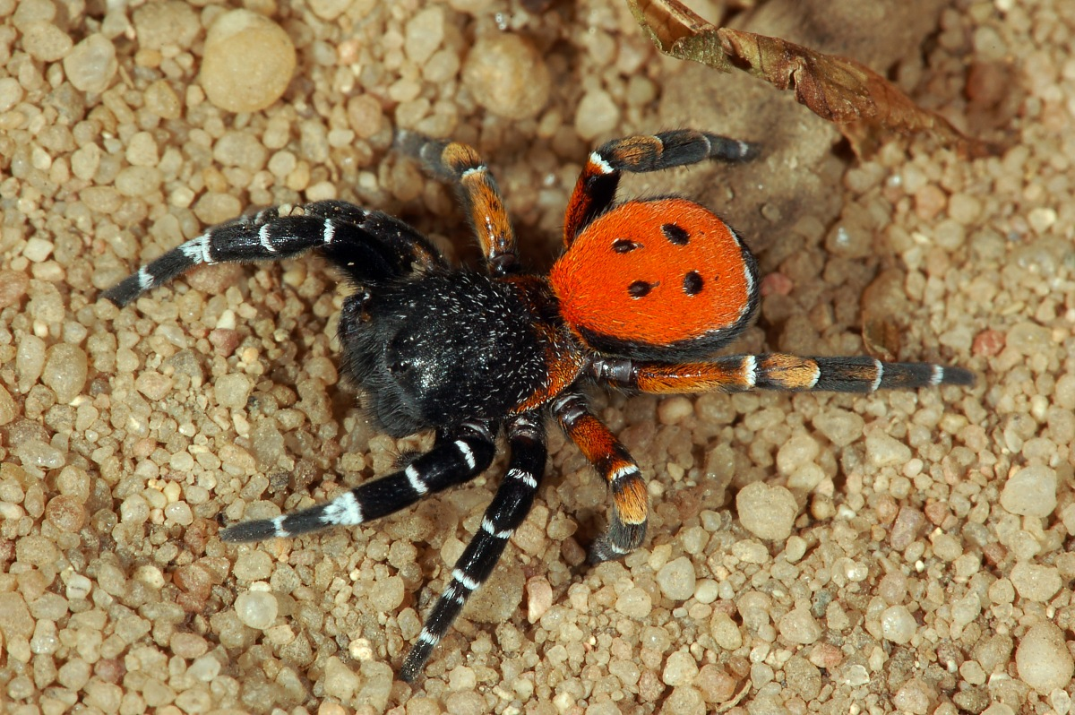 Eresus kollari, Pfungstädter Düne, Pfungstadt, Hessen, Deutschland